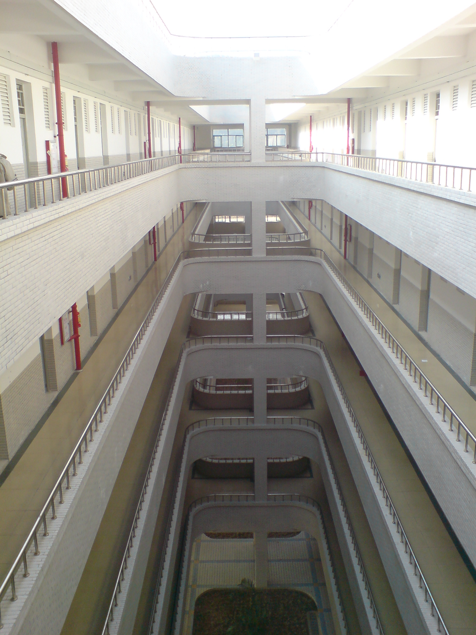 吉林大學珠海學院某棟宿舍樓內